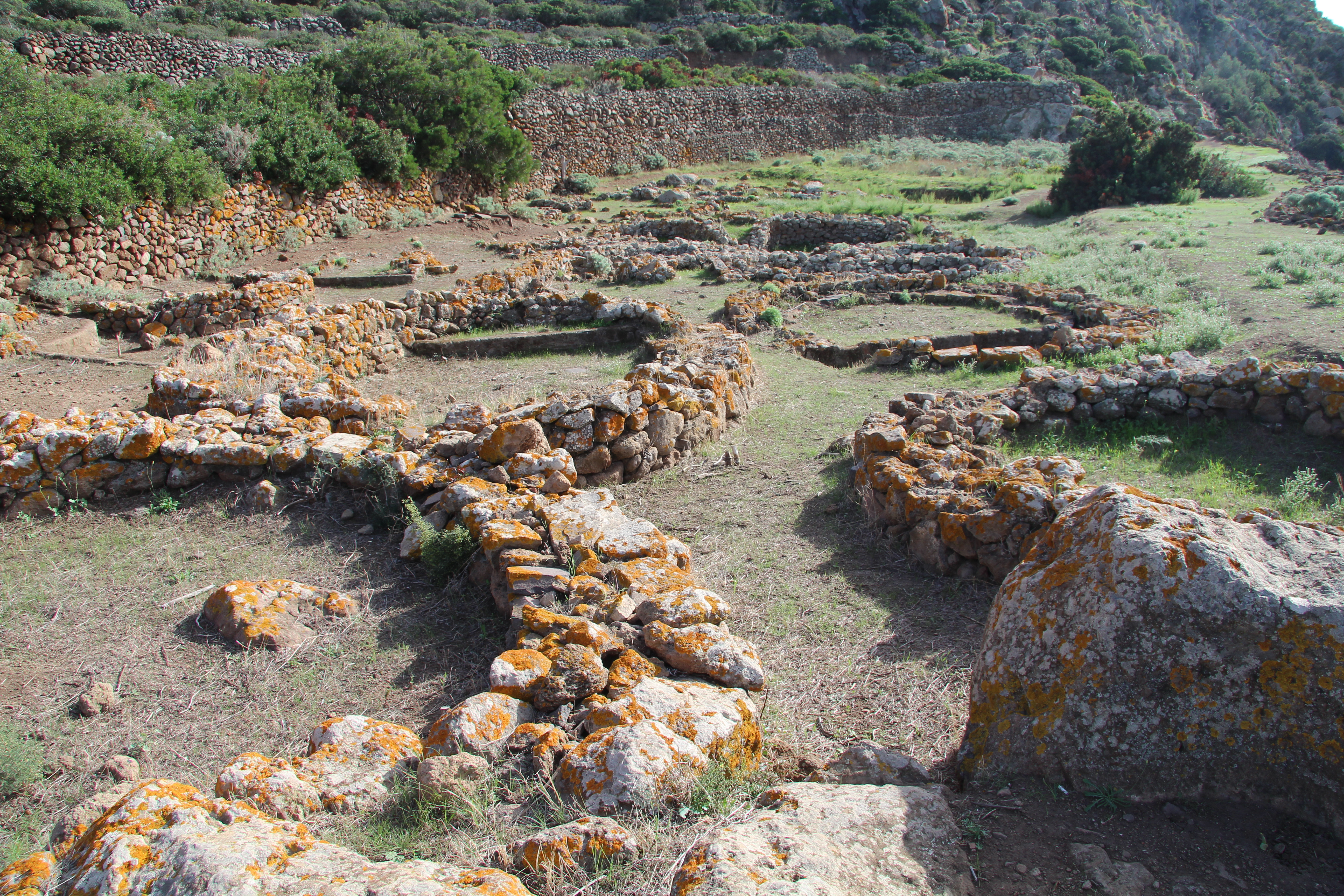 Bronzezeitliche, vermutlich teilweise rekonstruierte Siedlungsreste auf der Halbinsel am Capo Graziano, Filicudi